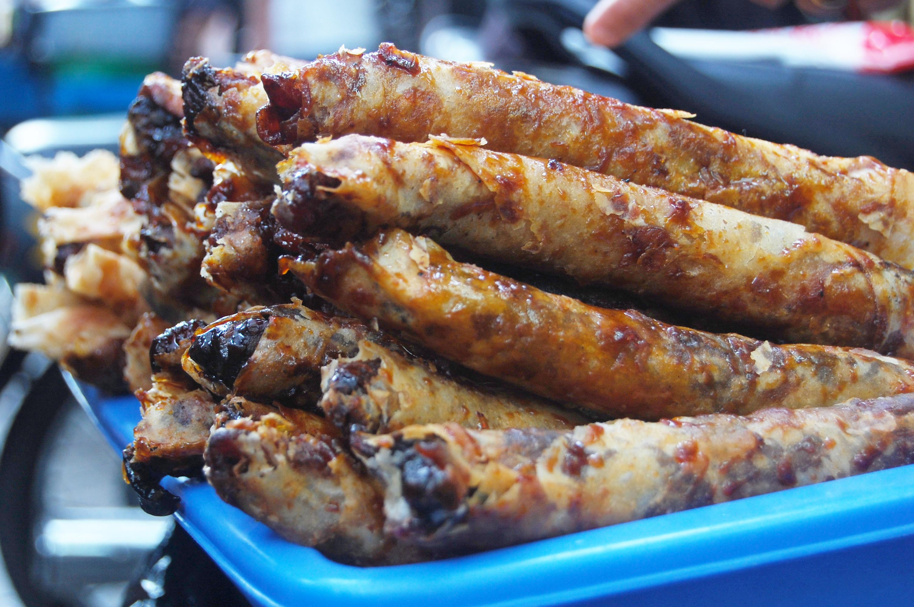 Makanan dari pisang yang dibungkus dengan kulit lumpia, digoreng, lalu diberi lelehan cokelat.